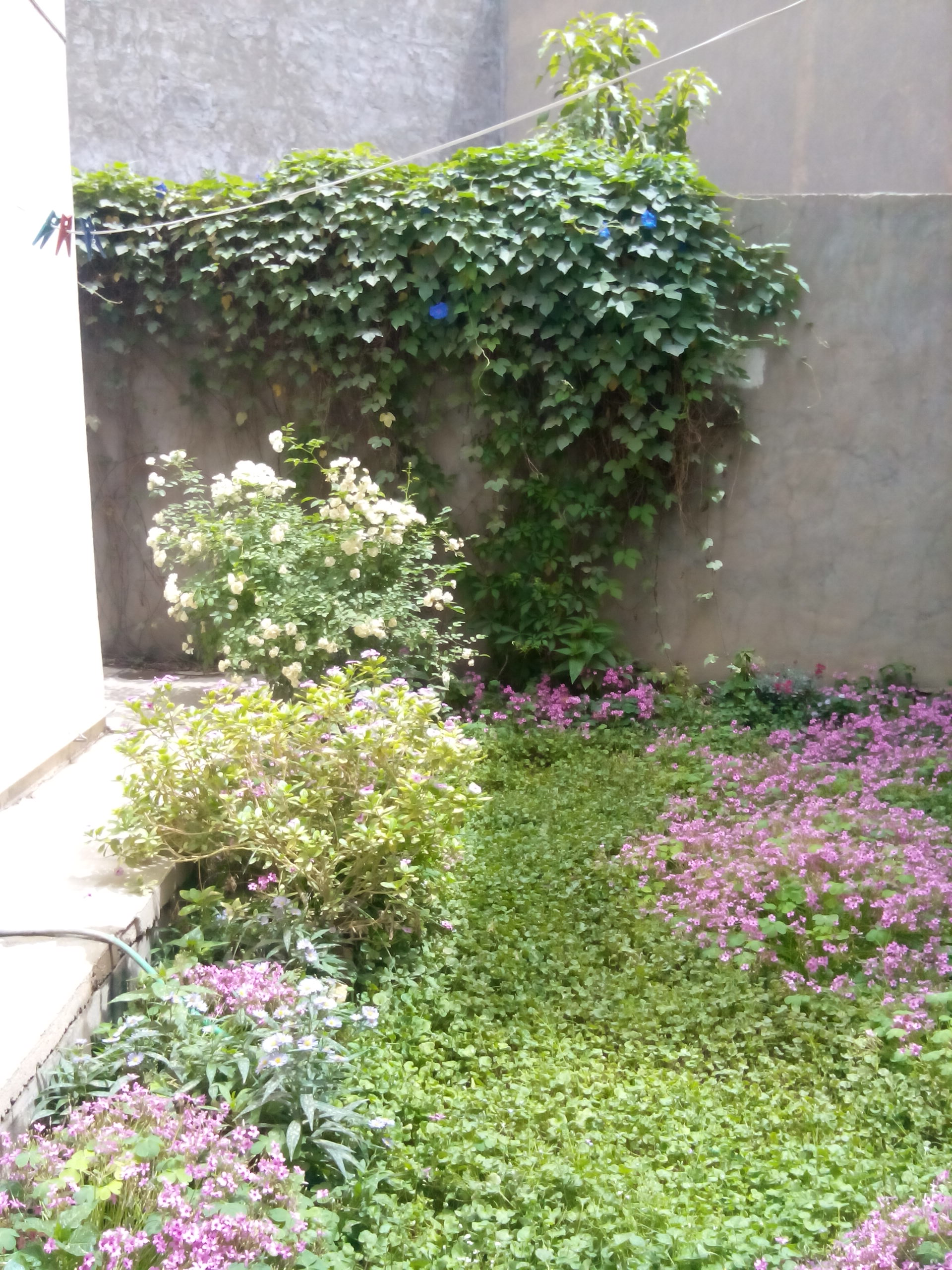 أزهار منوعة في الربيع لحديقة منزلية في بغداد